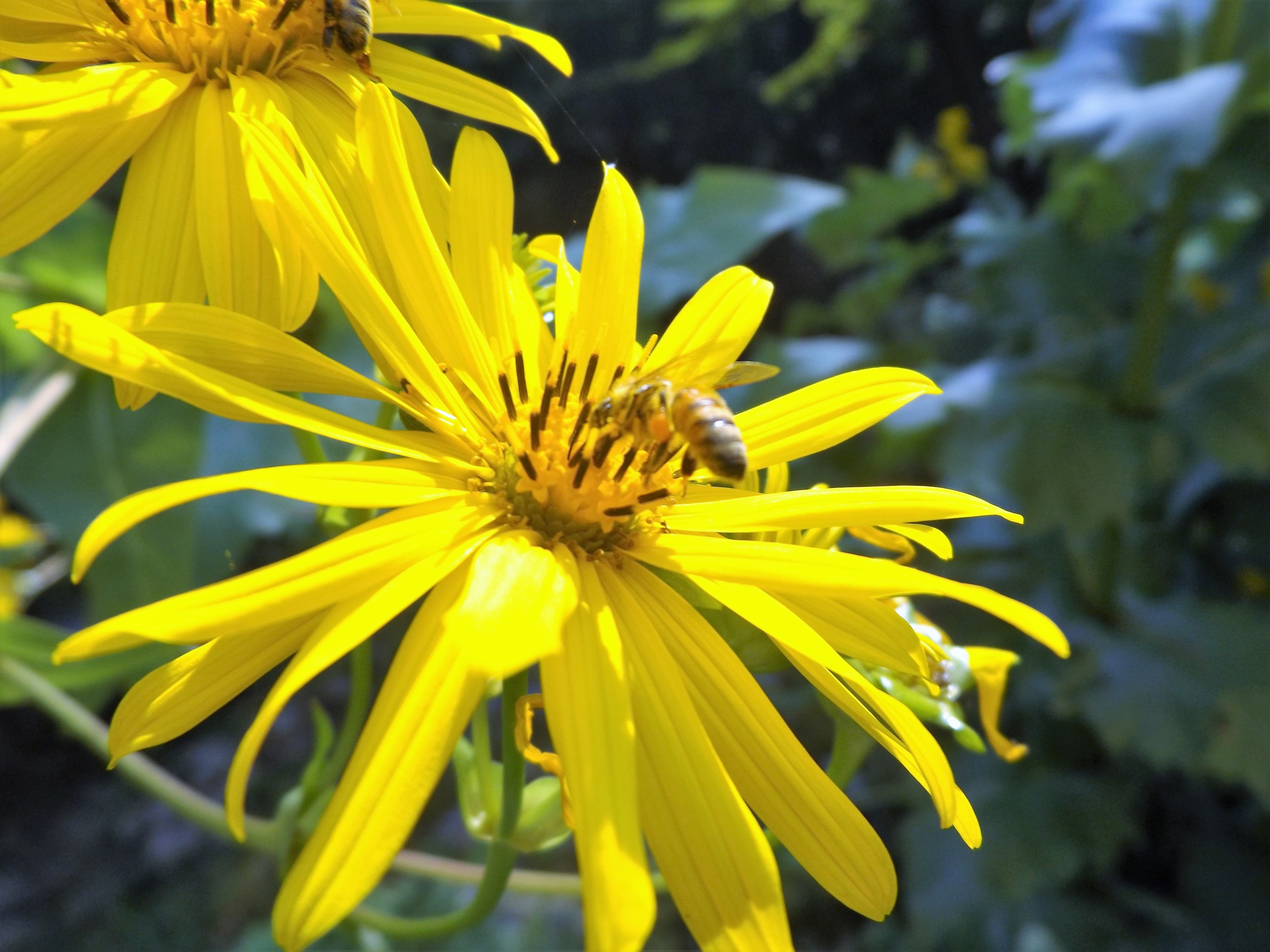 Abeille butine le capitule d'une silphie perfoliée, Sud du Québec.